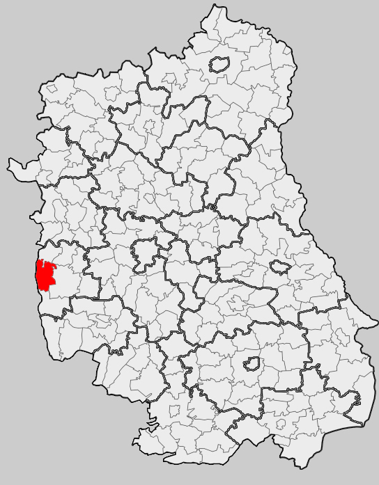 Map of gmina Łaziska, Opole Lubelskie county, Lublin voivodship Mapa gminy Łaziska, powiat opolski, województwo lubelskie